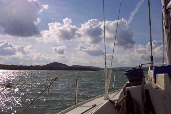 Lac de Madine mit dem Berg Montec, Herbst 2002 Fotograf: Renbo